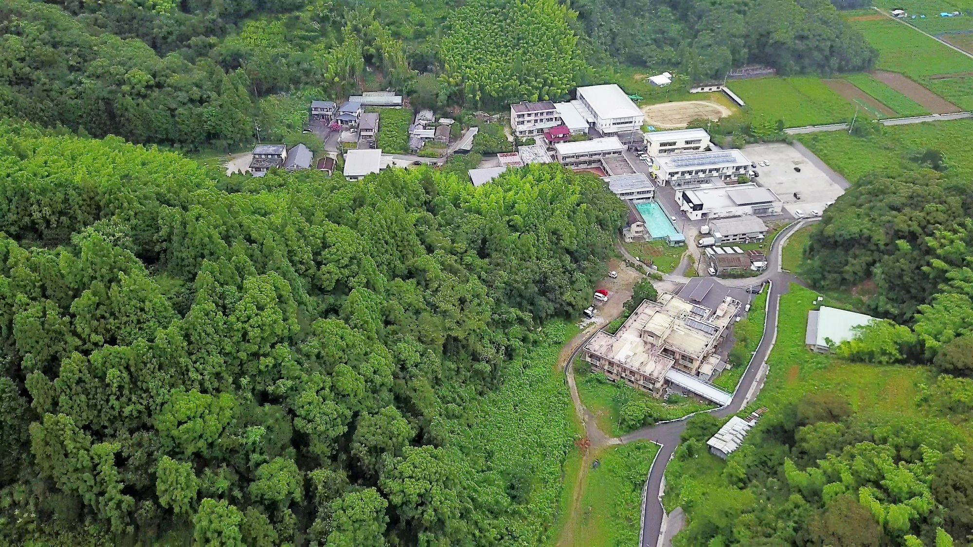 光の村上空からの様子